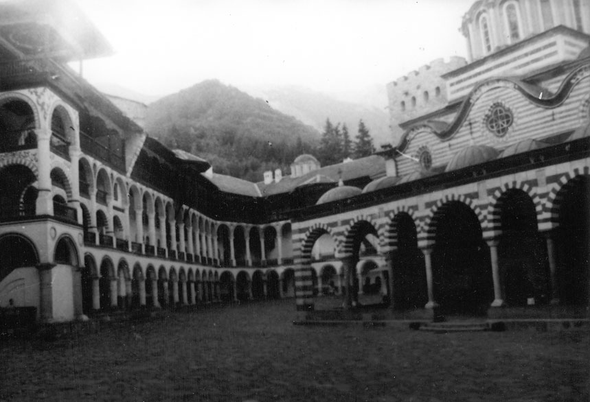 RRilakloster in Bulgarien Sommer 1975